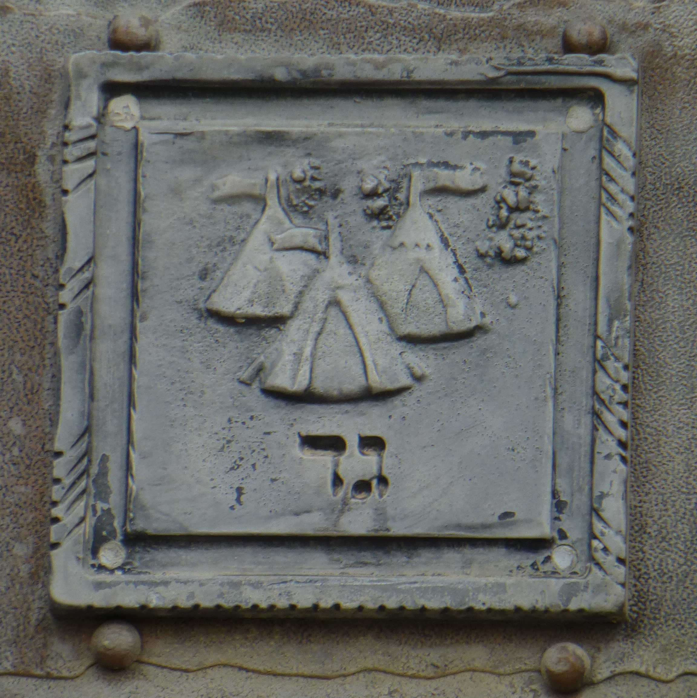 בית הכנסת הגדול "אוהל שרה" - בית הכנסת הראשון של רחובות, נבנה בשנת תרס"ד? ובהמשך שופץ והורחב והיה למוקד הקהילתי והחברתי של המושבה הצעירה.